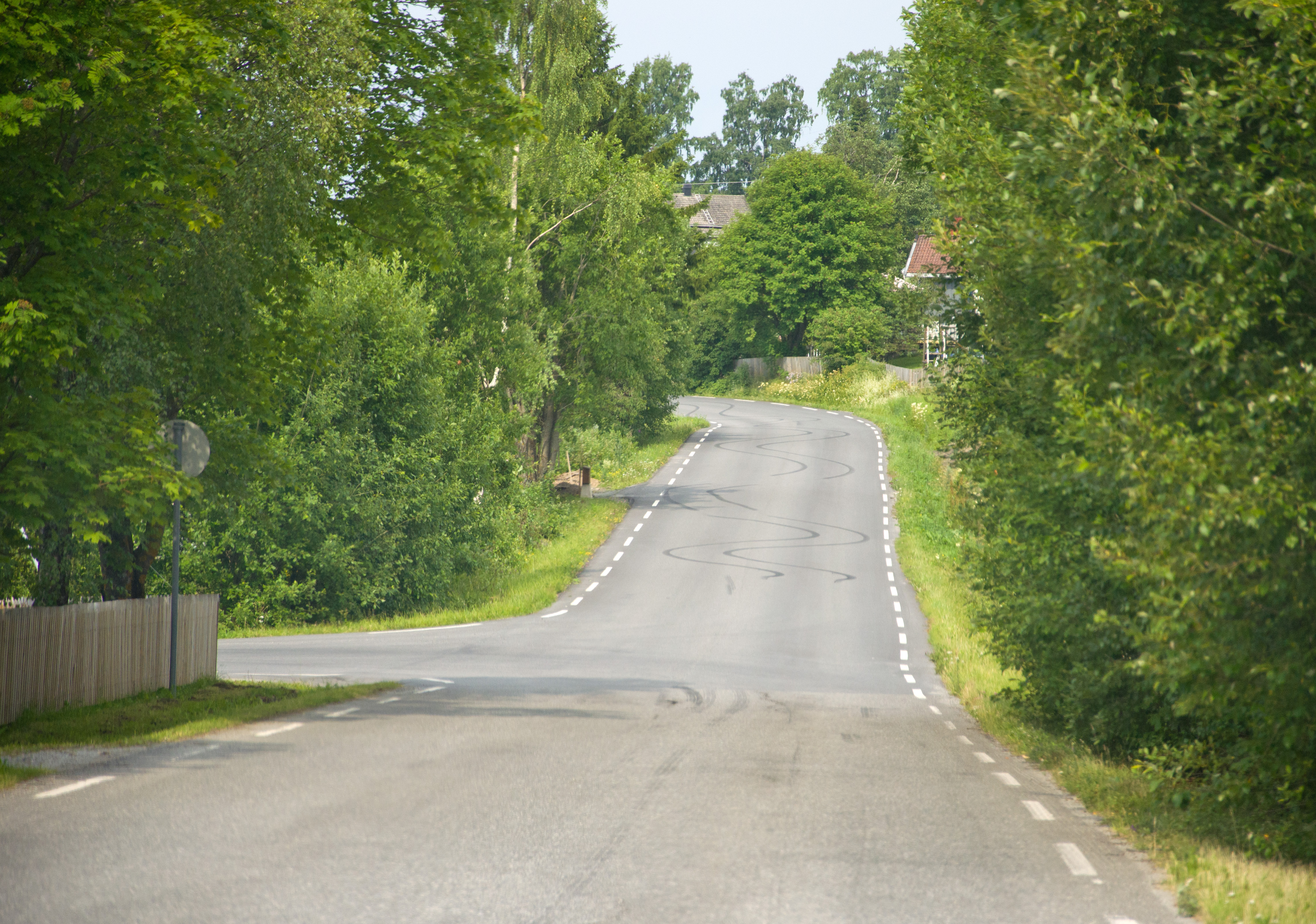 Fylkesvei 1746 (tidl. 73) Jessnesvegen, krysset ved fylkesvei 1736